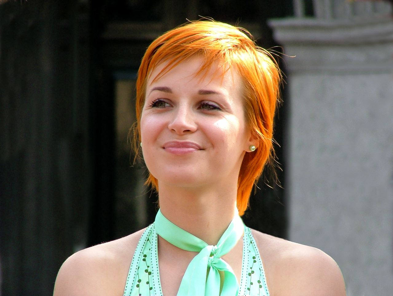 Victoria KoblenkoVictoria